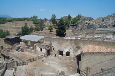 جانب من المدينة.